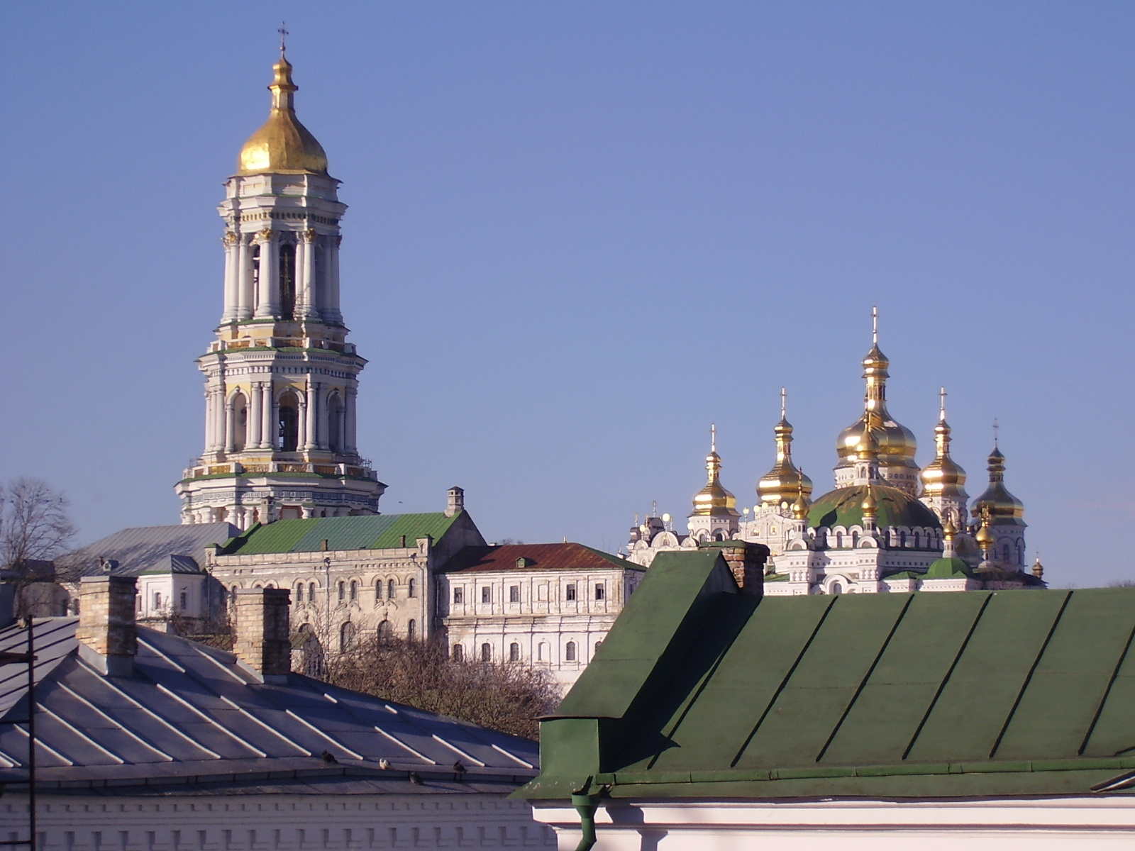 Дзвіниця велика Успенського собору, Київ, Лаврська вул., 21